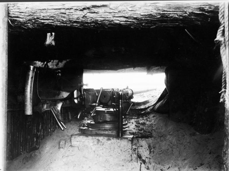 Unterstand